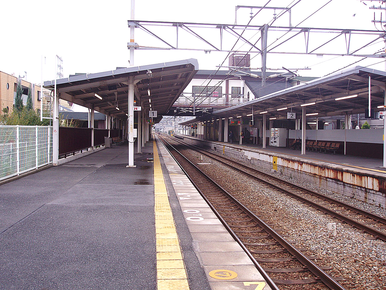 West Japan Railway Fukuchiyama Line（JR Takarazuka Line） Nakayamadera Station Platform 西日本旅客鉄道 福知山線 中山寺駅 駅ホーム